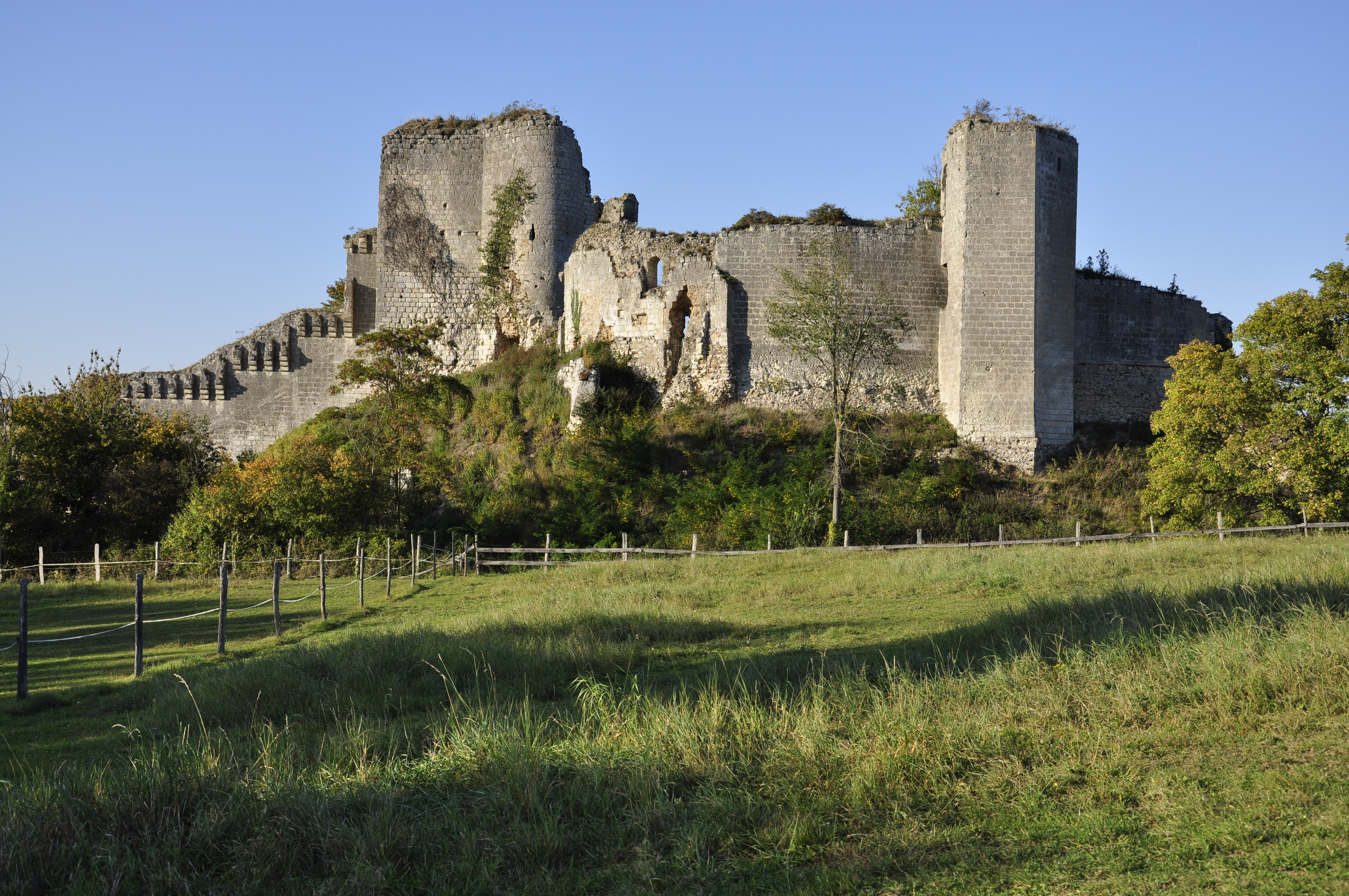 Château de Montoire-sur-le-Loir (Loir-et-Cher, France) .